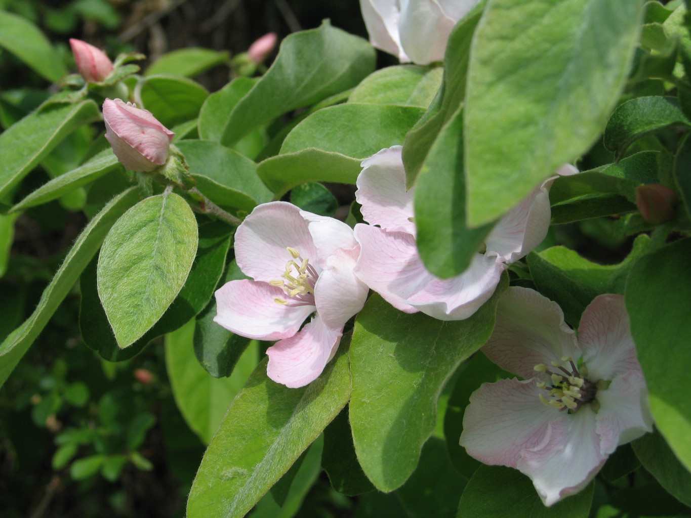 Fleurs et feuilles de cognassier (Cydonia oblonga).